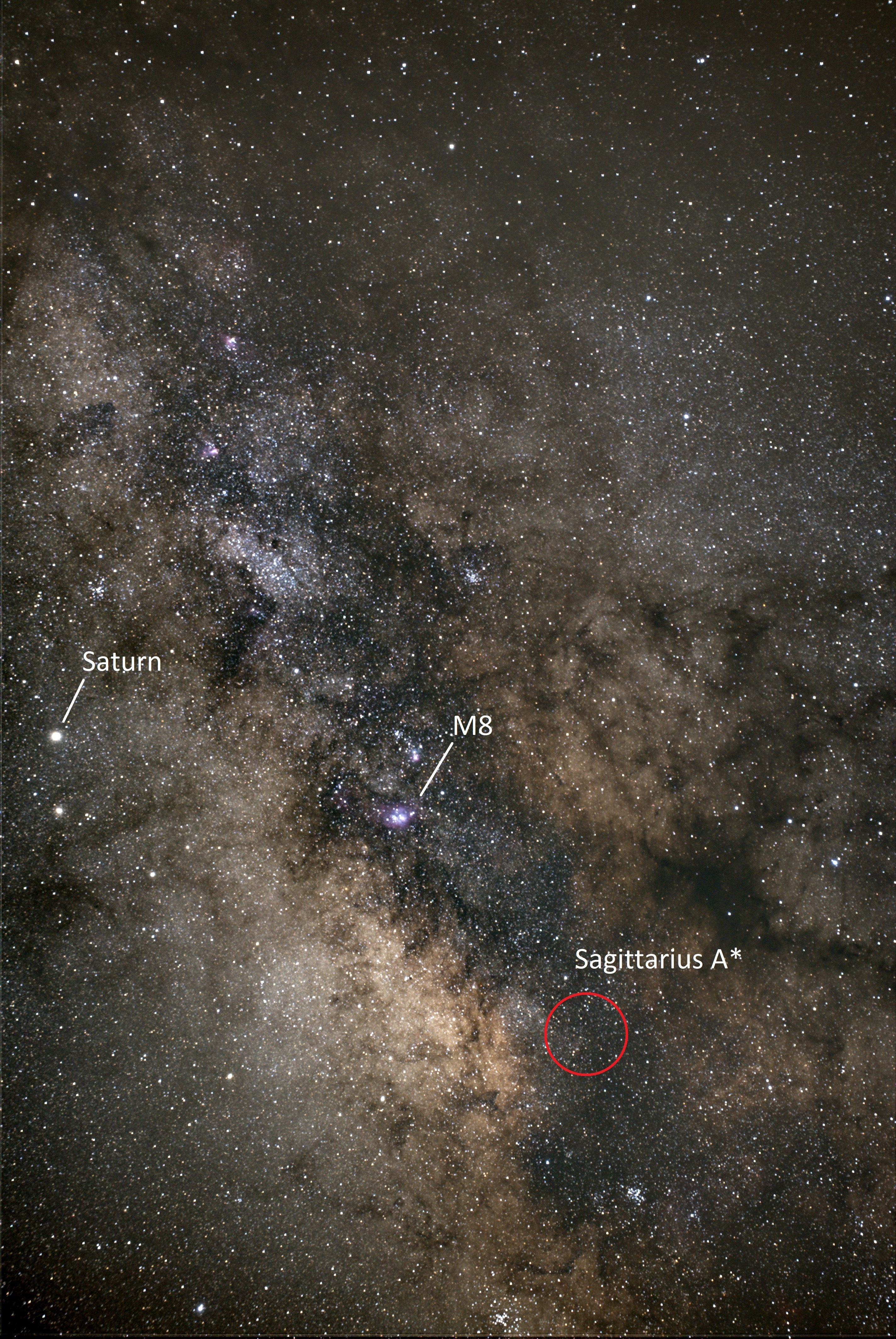 Sagittarius A* am Südhorizont in sichtbarem Licht. Fotografie mit Kamera Sony alpha 7S, 80 mm Objektiv, Belichtungszeit 5 Minuten, ISO 3200, Ort: Donji Lapac, Kroatien.